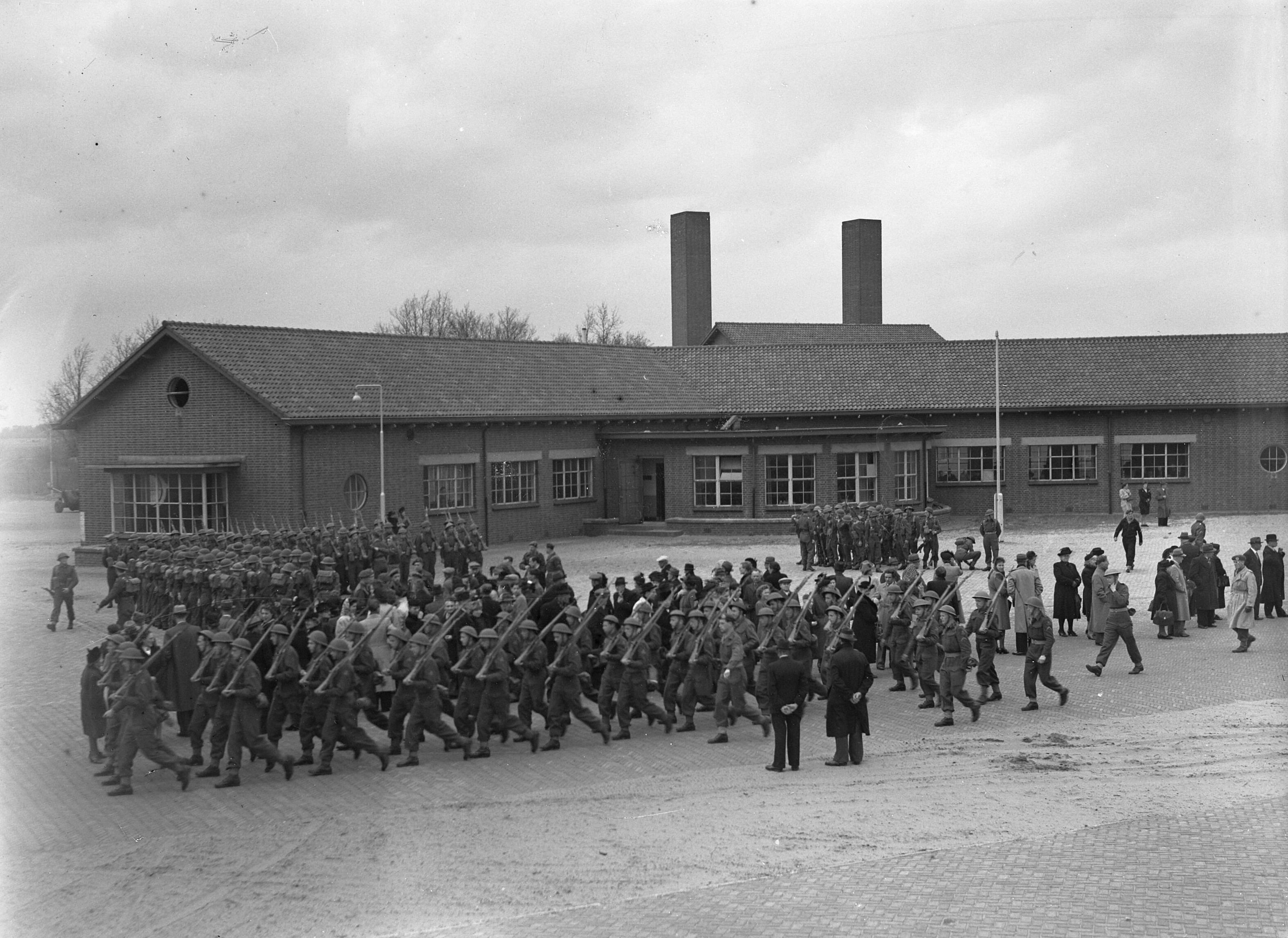 Collectie / Archief : Fotocollectie Anefo Reportage / Serie : [ onbekend ] Beschrijving : Ouderdag in kazerne te Vught, zie 26630/31 Datum : 2 april 1948 Locatie : Noord-Brabant, Vught Trefwoorden : kazernes Fotograaf : Moedrik, D. / Anefo Auteursrechthebbende : Nationaal Archief Materiaalsoort : Glasnegatief Nummer archiefinventaris : bekijk toegang 2.24.01.09 Bestanddeelnummer : 902-6644